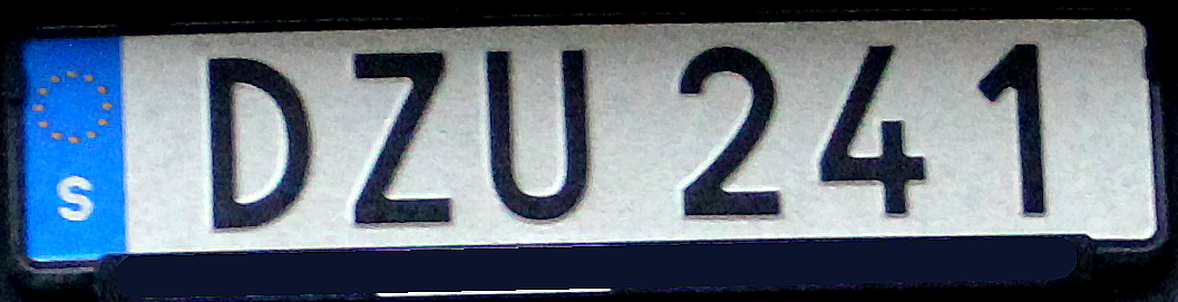 ny regskylt f.o.m 2014